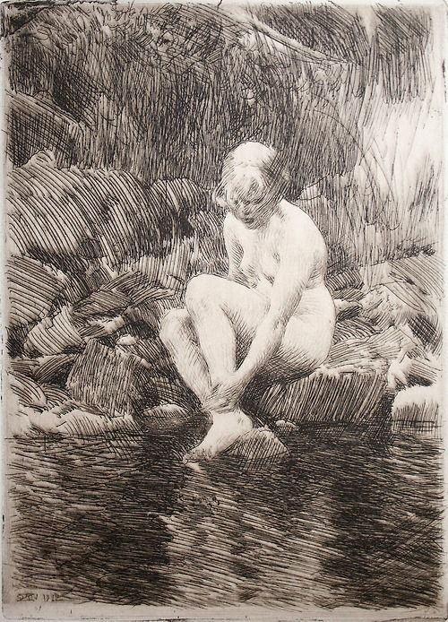 Dagmar